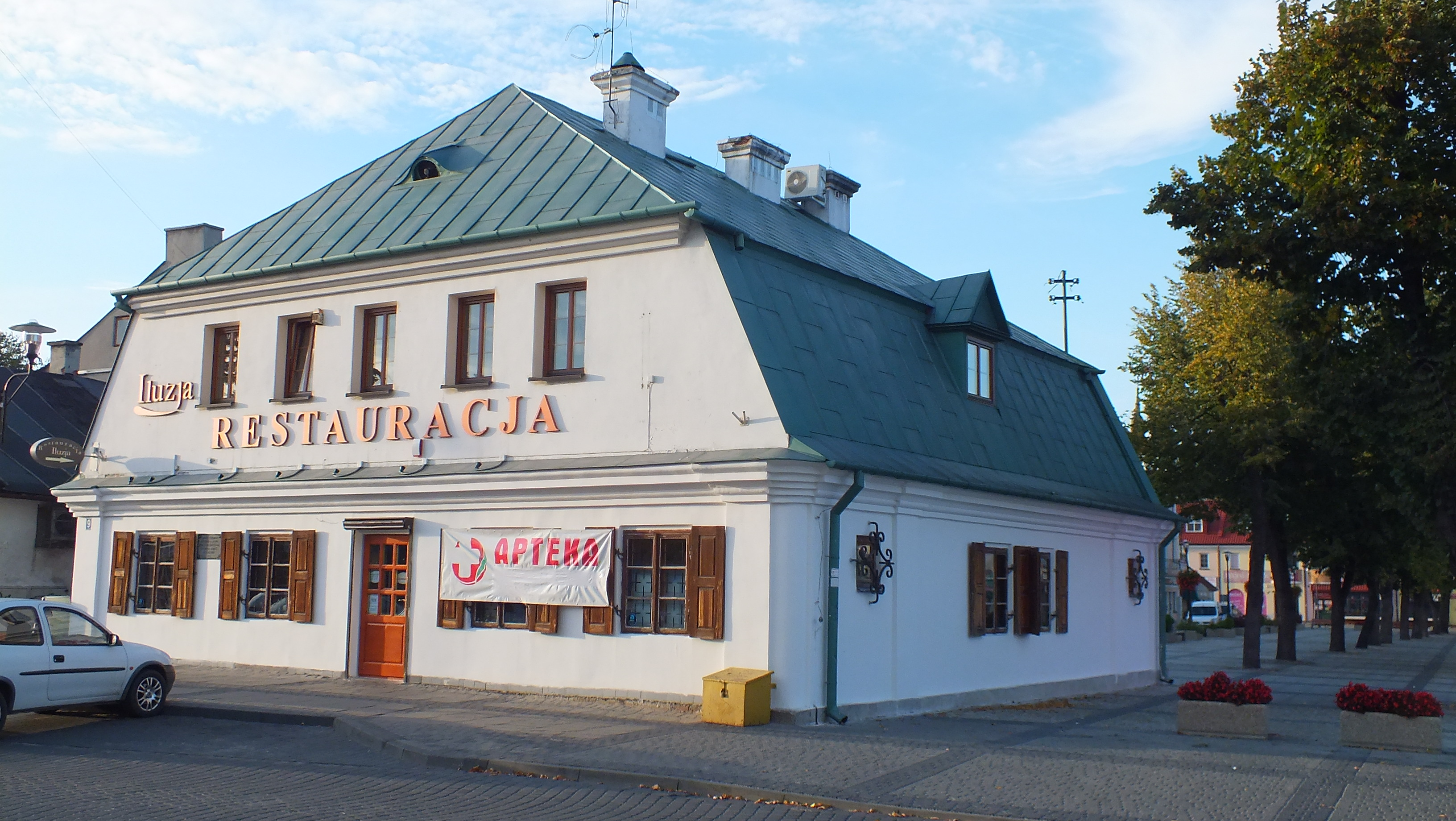 Dom ul. Jana Pawła II (d..Poprzeczna) 9, miasto Lubartów 04.1974.